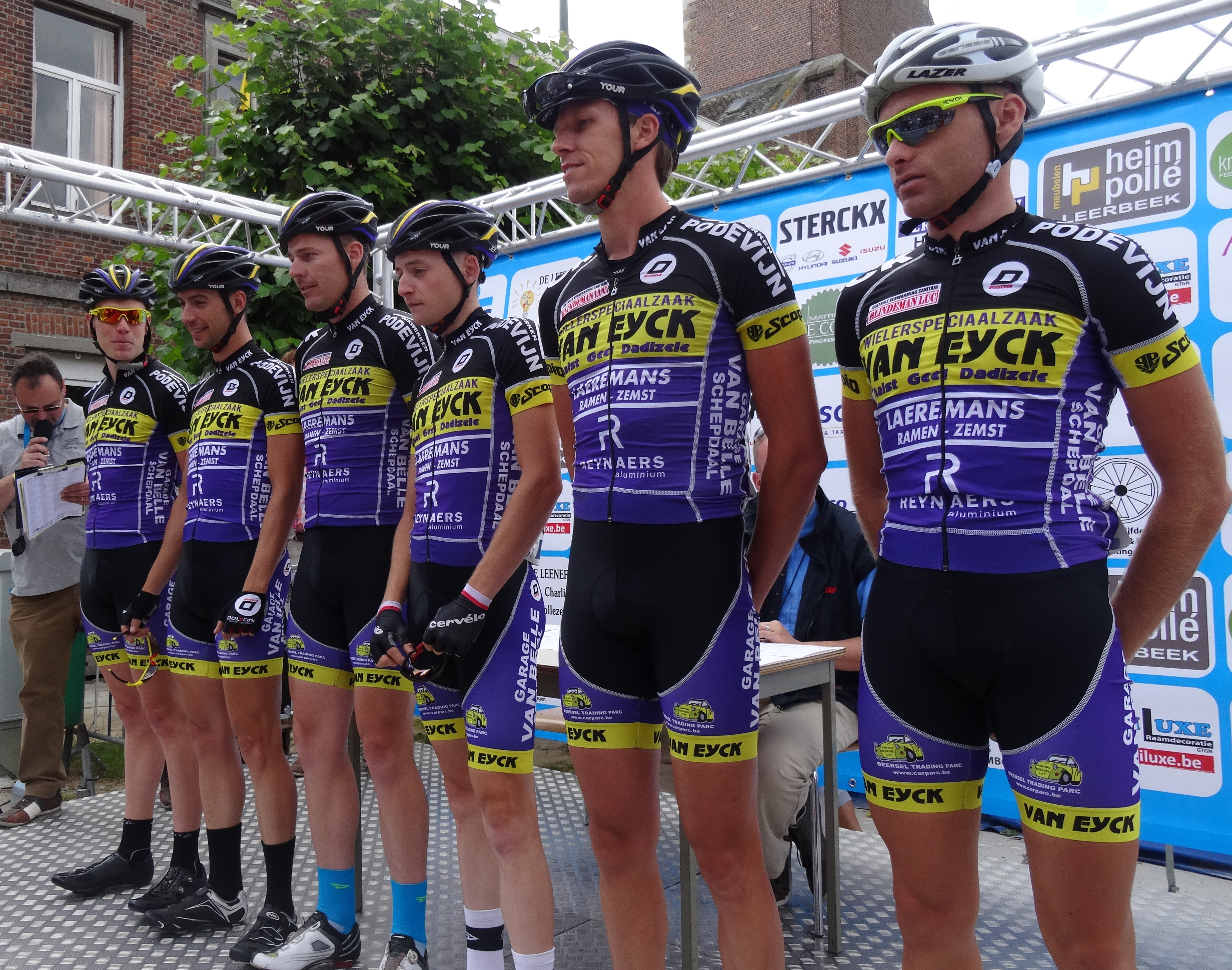 Reportage photographique réalisé le mercredi 25 juin à l'occasion du départ et de l'arrivée de l'Internationale Wielertrofee Jong Maar Moedig 2014 à Oetingen (Gooik), Belgique.